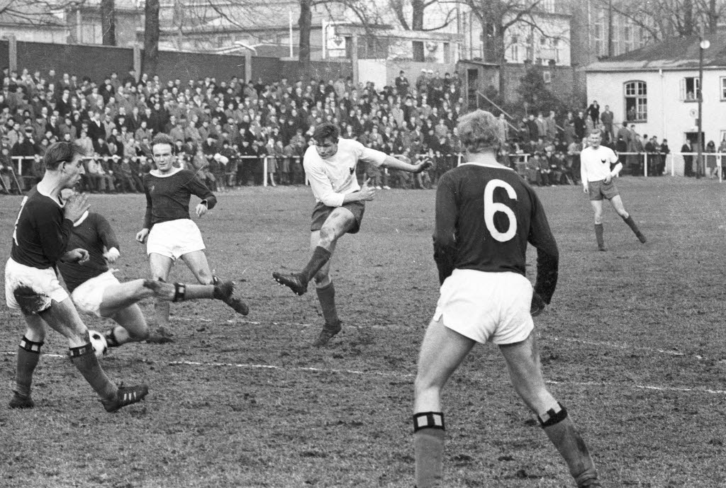 im Stadion Waldwiese an der Hamburger Chaussee. Im Bild u.a. Lübecks Nogly (4.v.l.) und VfB-Spieler Paulsen (1.v.l.).